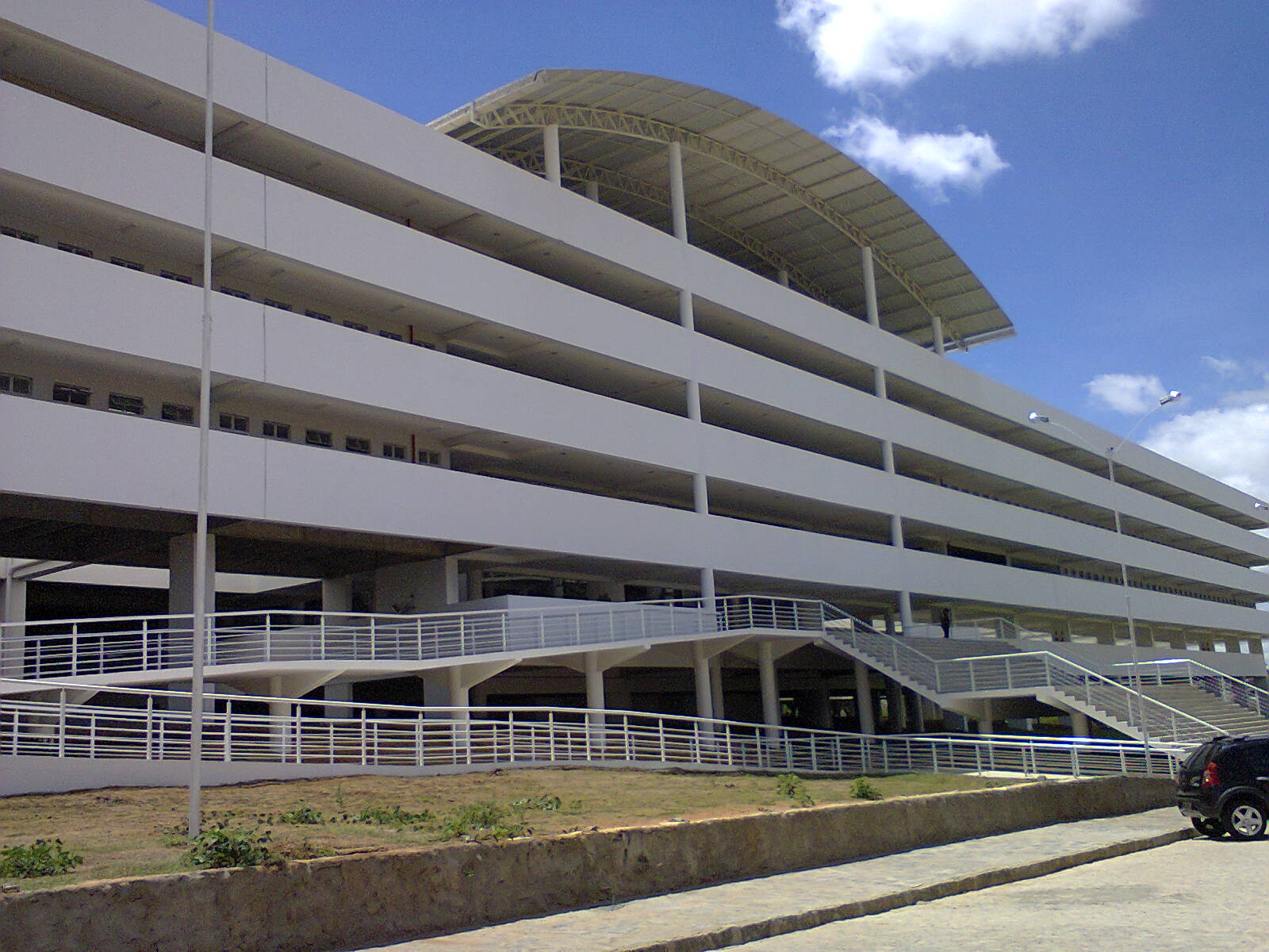 Central de Aulas da Universidade Estadual da Paraíba.